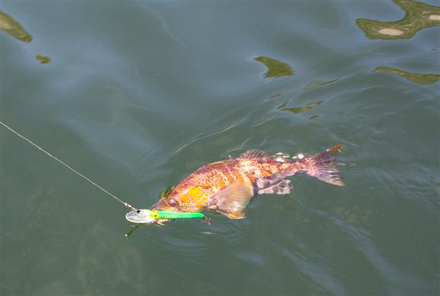 Paralabrax humeralis, peninsula de Mejillones, Antofagasta, Chile